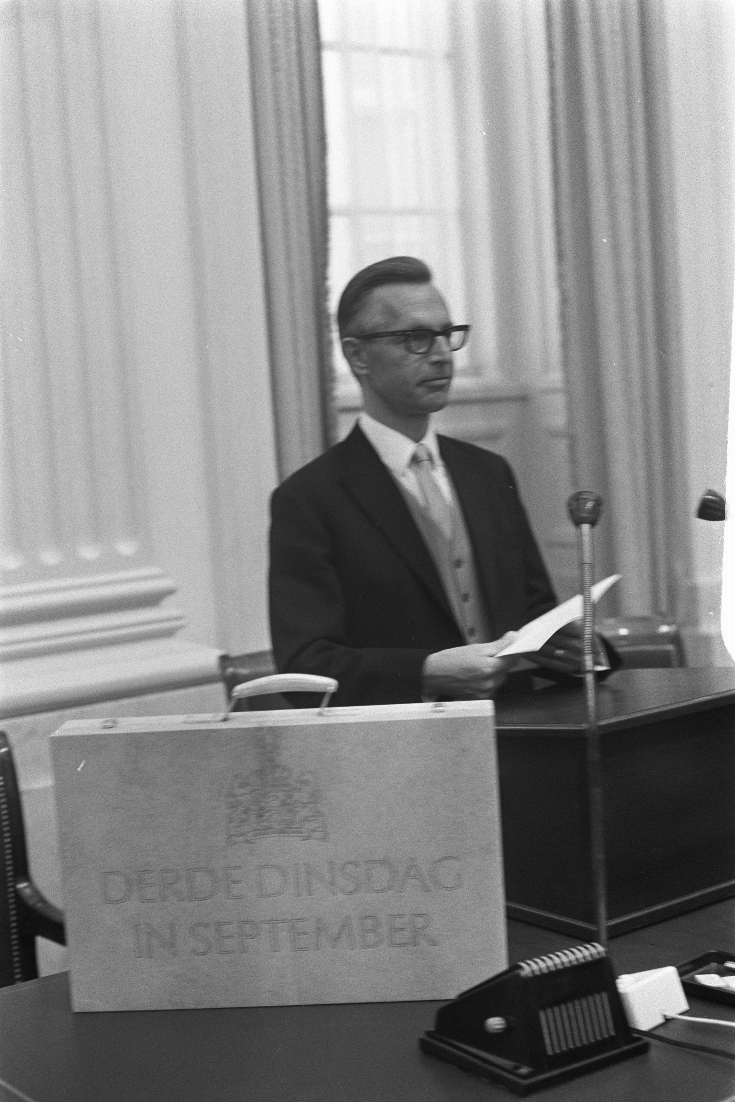 Collectie / Archief : Fotocollectie Anefo Reportage / Serie : Prinsjesdag 1971 Beschrijving : Prinsjesdag 1971; minister van Financien Nelissen met het miljoenenkoffertje in de Tweede Kamer in Den Haag Datum : 21 september 1971 Locatie : Den Haag, Zuid-Holland Trefwoorden : ministers, overheidsbegrotingen Persoonsnaam : Nelissen, R.J. Fotograaf : Rob Mieremet / Anefo Auteursrechthebbende : Nationaal Archief Materiaalsoort : Negatief (zwart/wit) Nummer archiefinventaris : bekijk toegang 2.24.01.05 Bestanddeelnummer : 924-9583